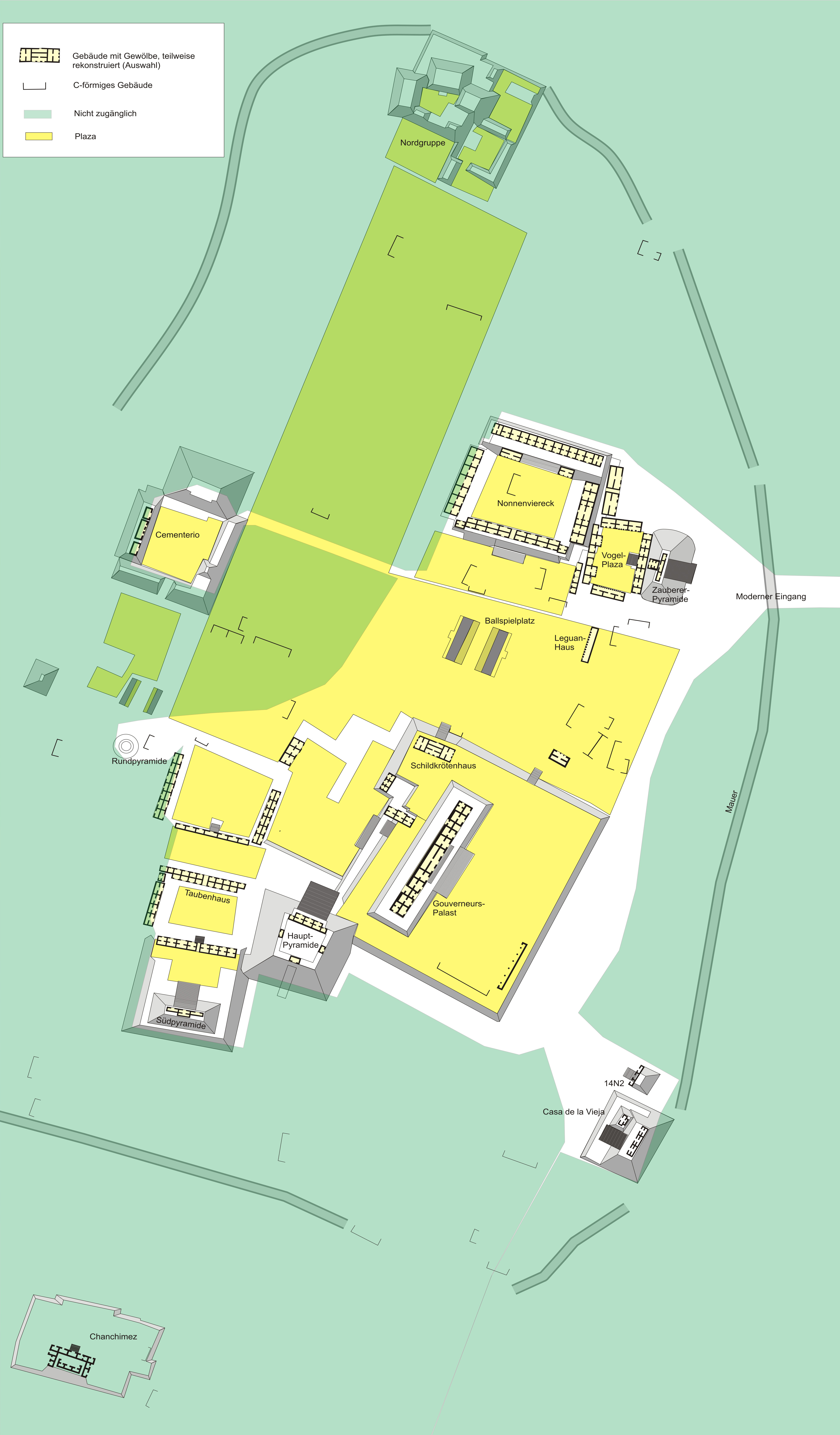 Plan — Uxmal, Yucaan, Mexiko.